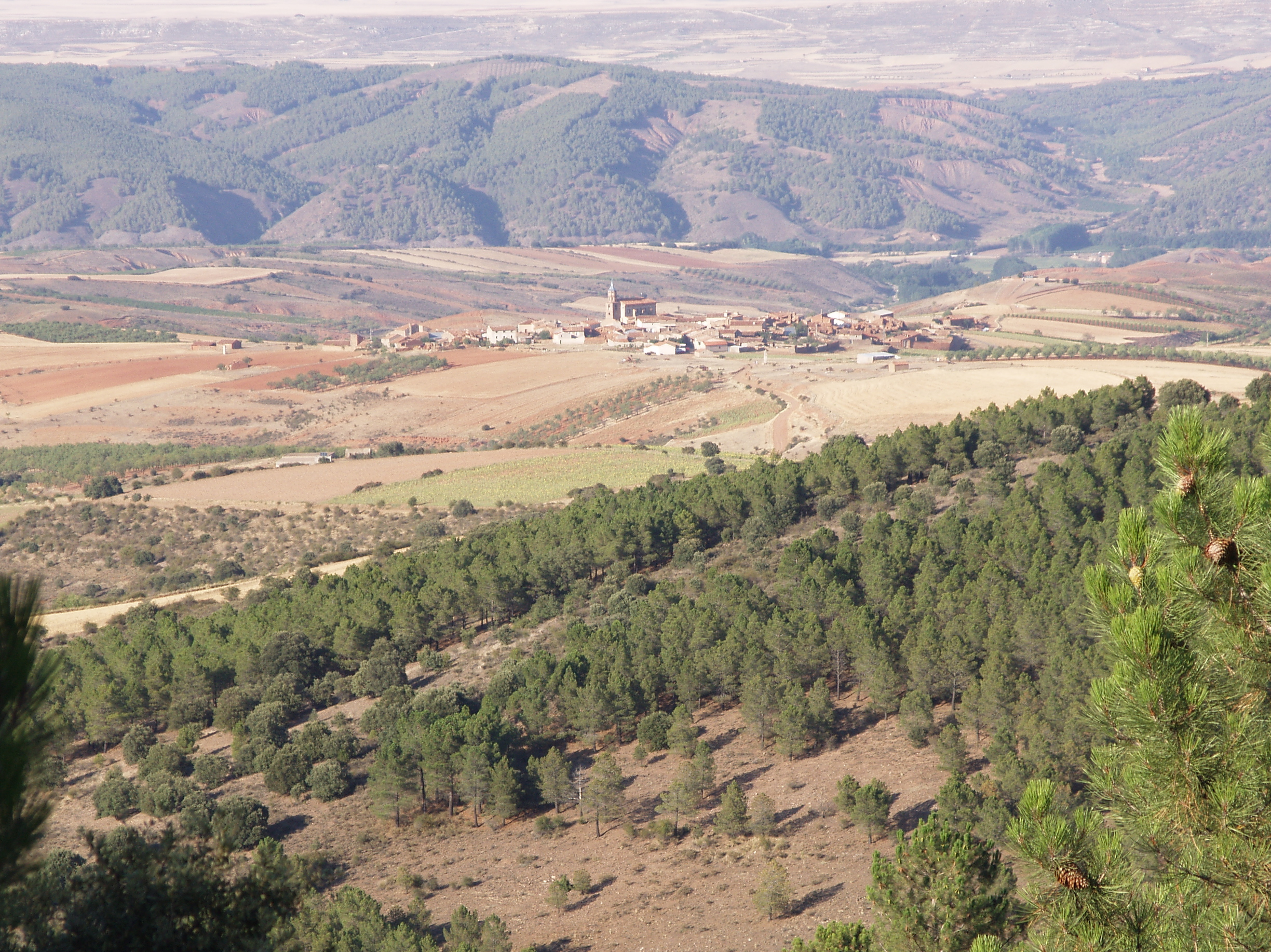 Panorámica de Orcajo.